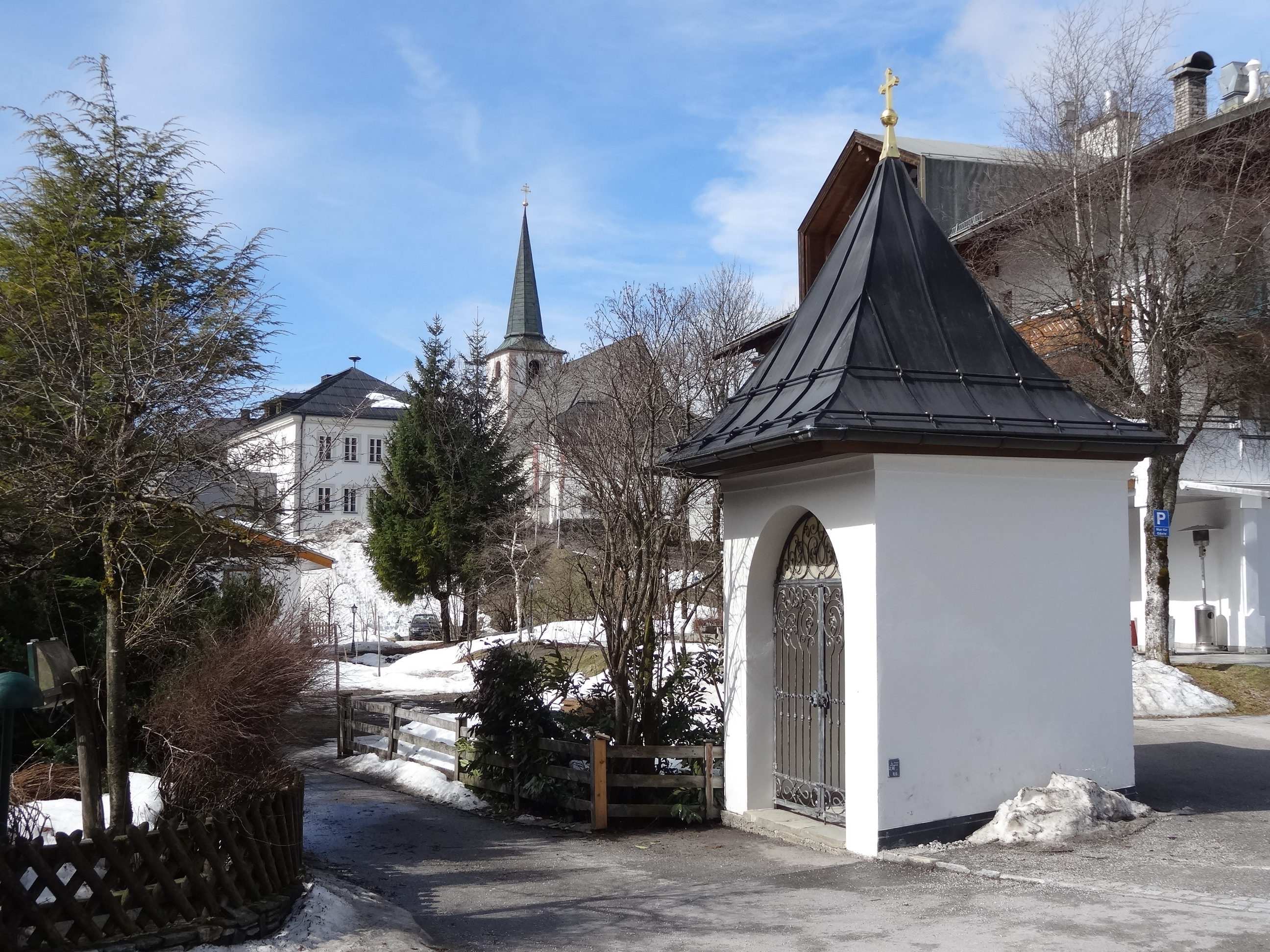 Ursprungskapelle Filzmoos